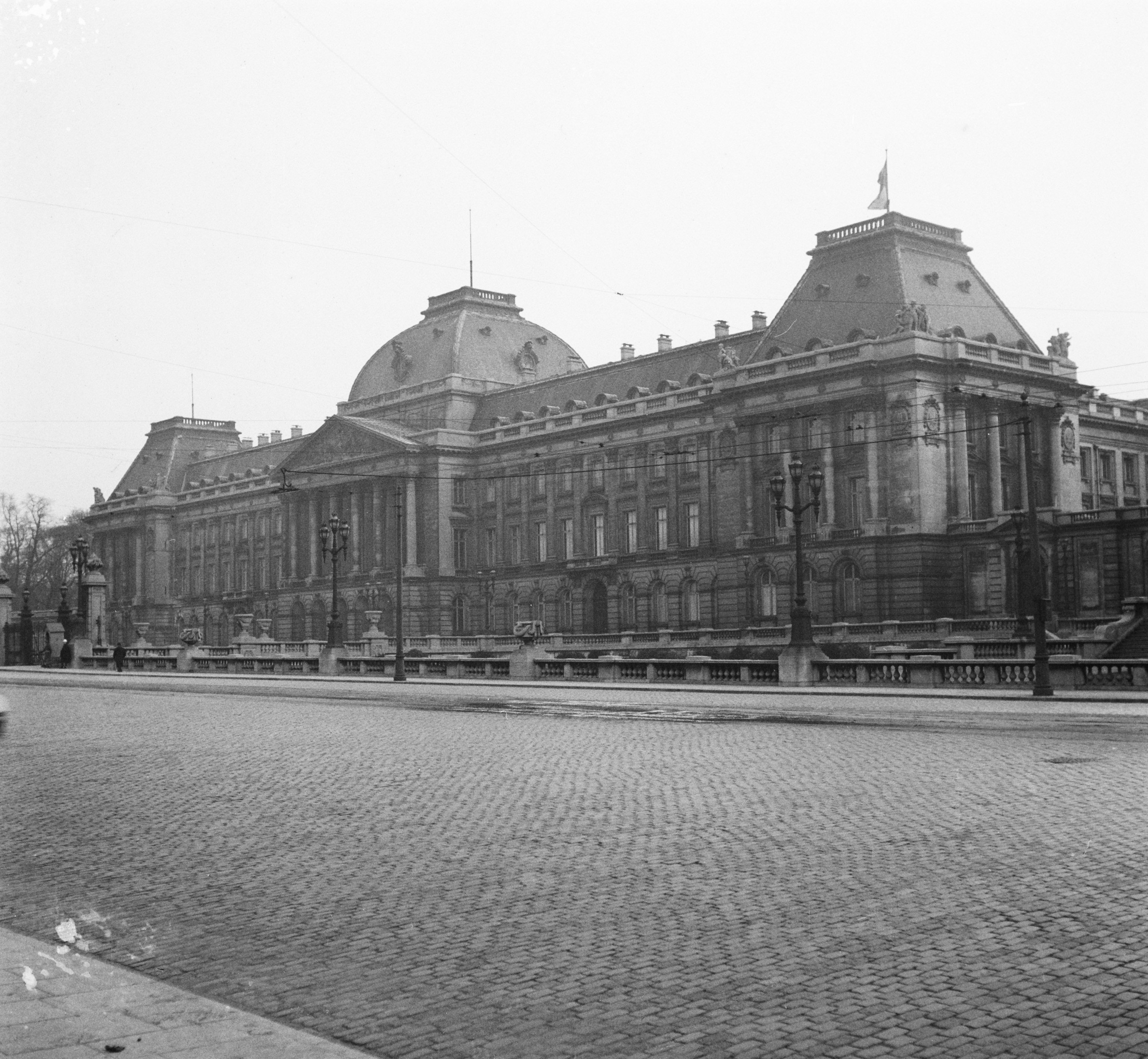 Collectie / Archief : Fotocollectie Anefo Reportage / Serie : [ onbekend ] Beschrijving : Koninklijk Paleis in Brussel Datum : 9 februari 1950 Locatie : Brussel Fotograaf : Fotograaf Onbekend / Anefo Auteursrechthebbende : Nationaal Archief Materiaalsoort : Negatief (zwart/wit) Nummer archiefinventaris : bekijk toegang 2.24.01.03 Bestanddeelnummer : 903-8197